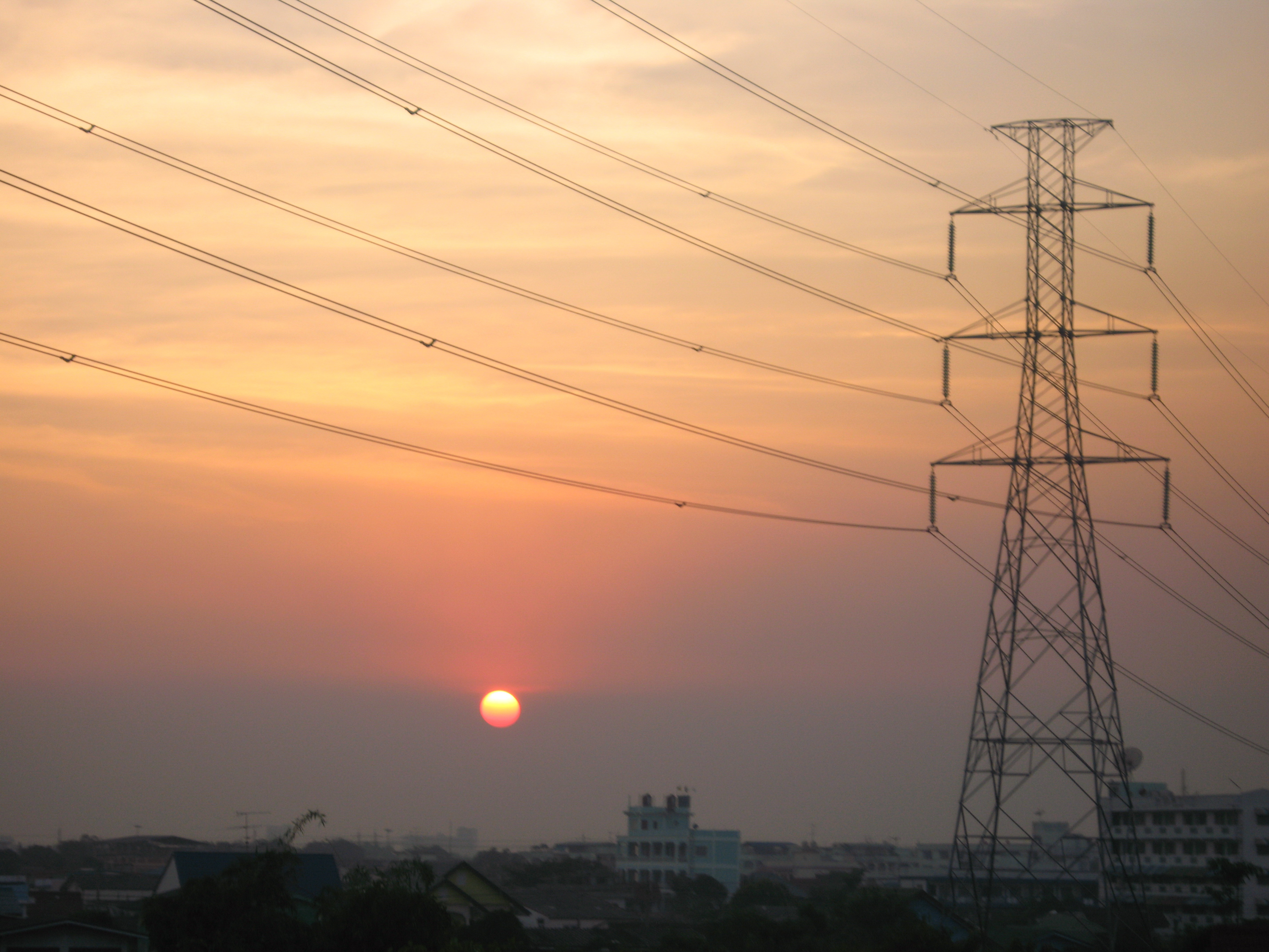 เสาไฟฟ้าแรงสูง